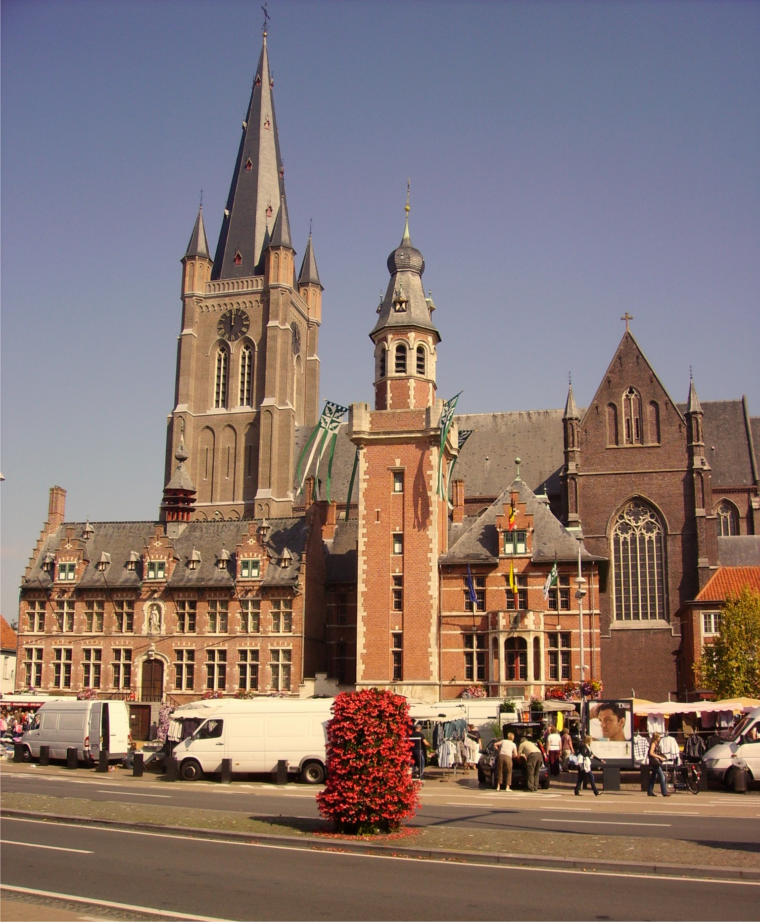 Kerk en stadhuis van Eeklo